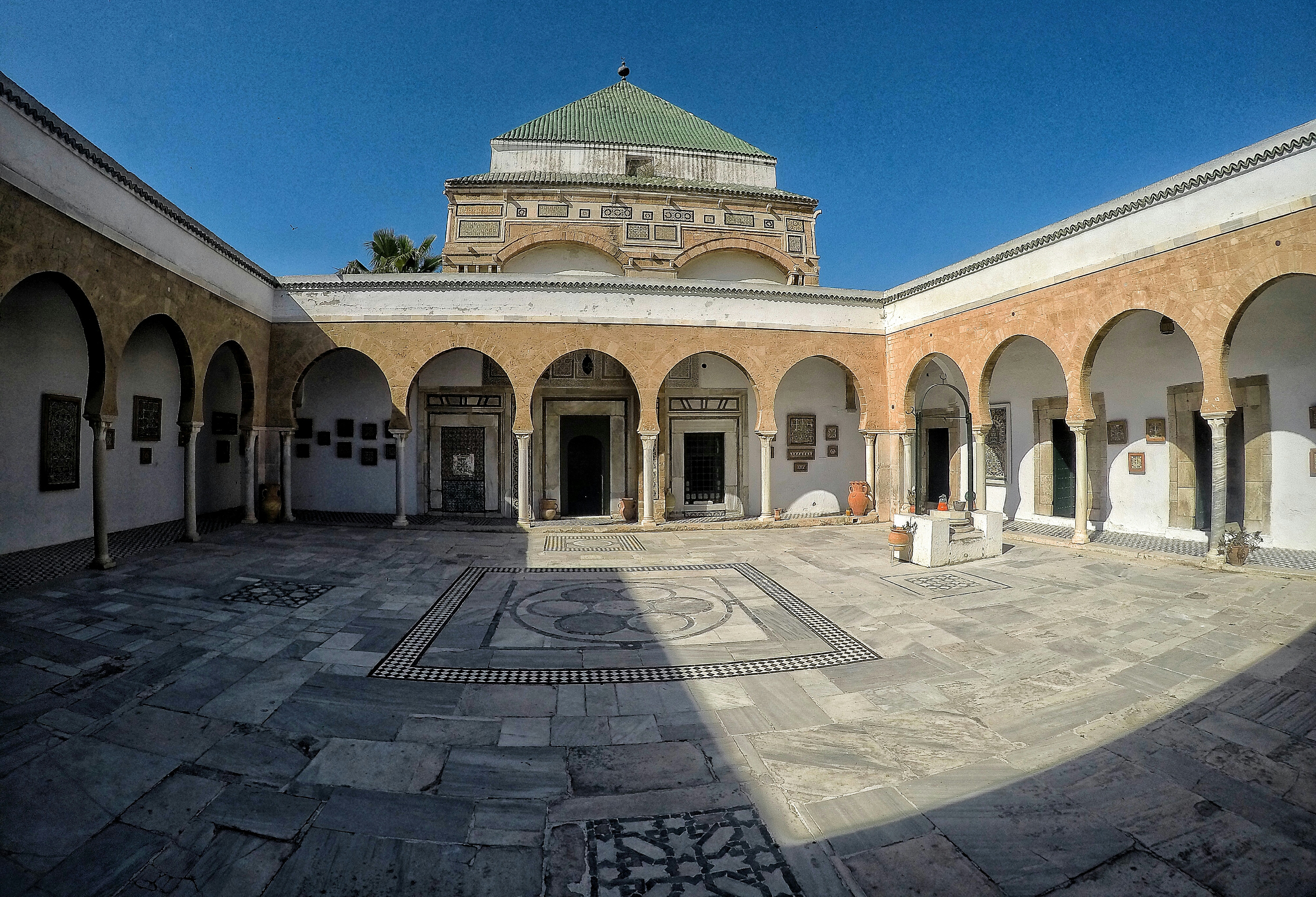 زاوية سيدي قاسم جليزي